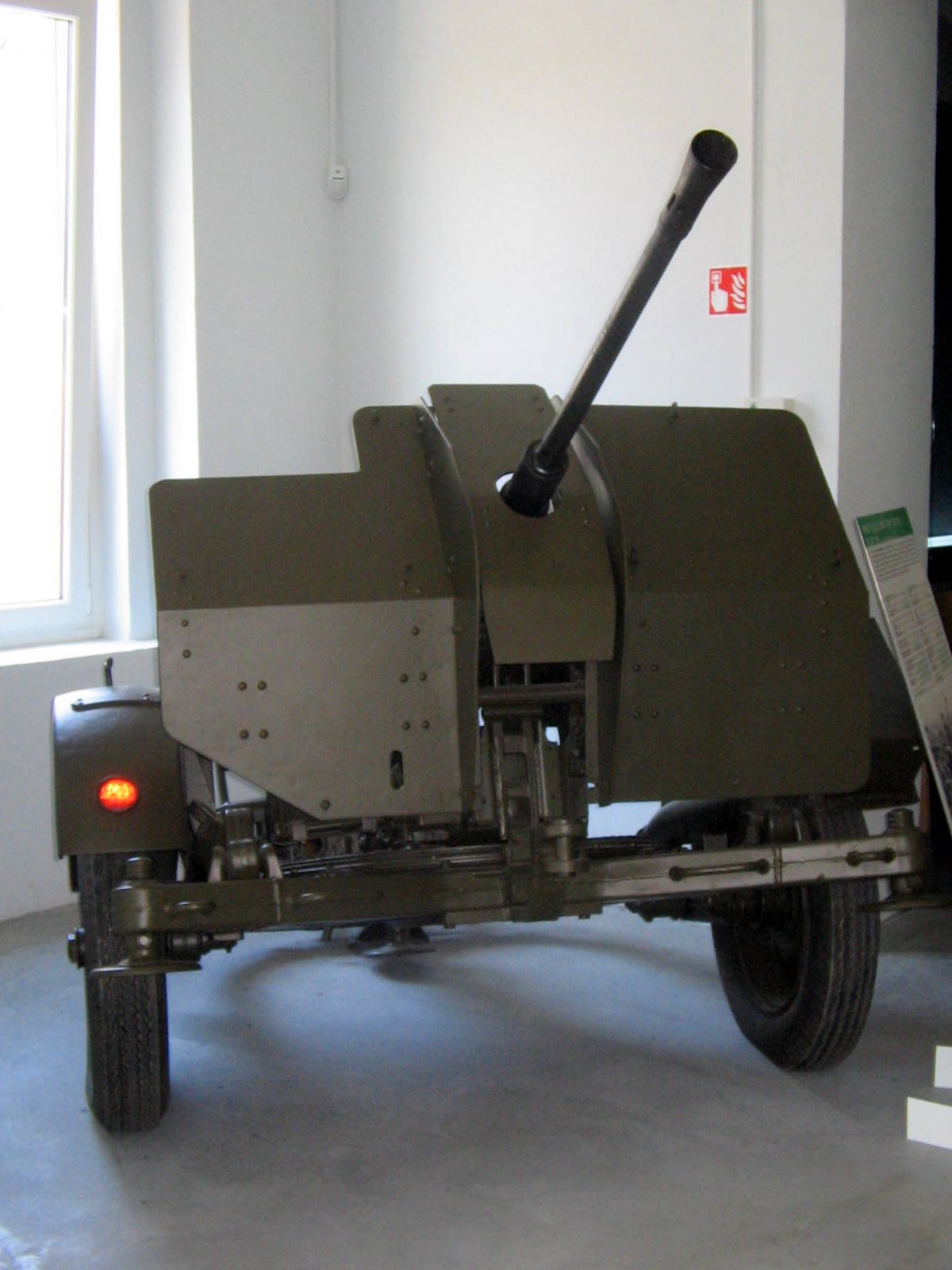 Park of Military History, Pivka, Slovenija